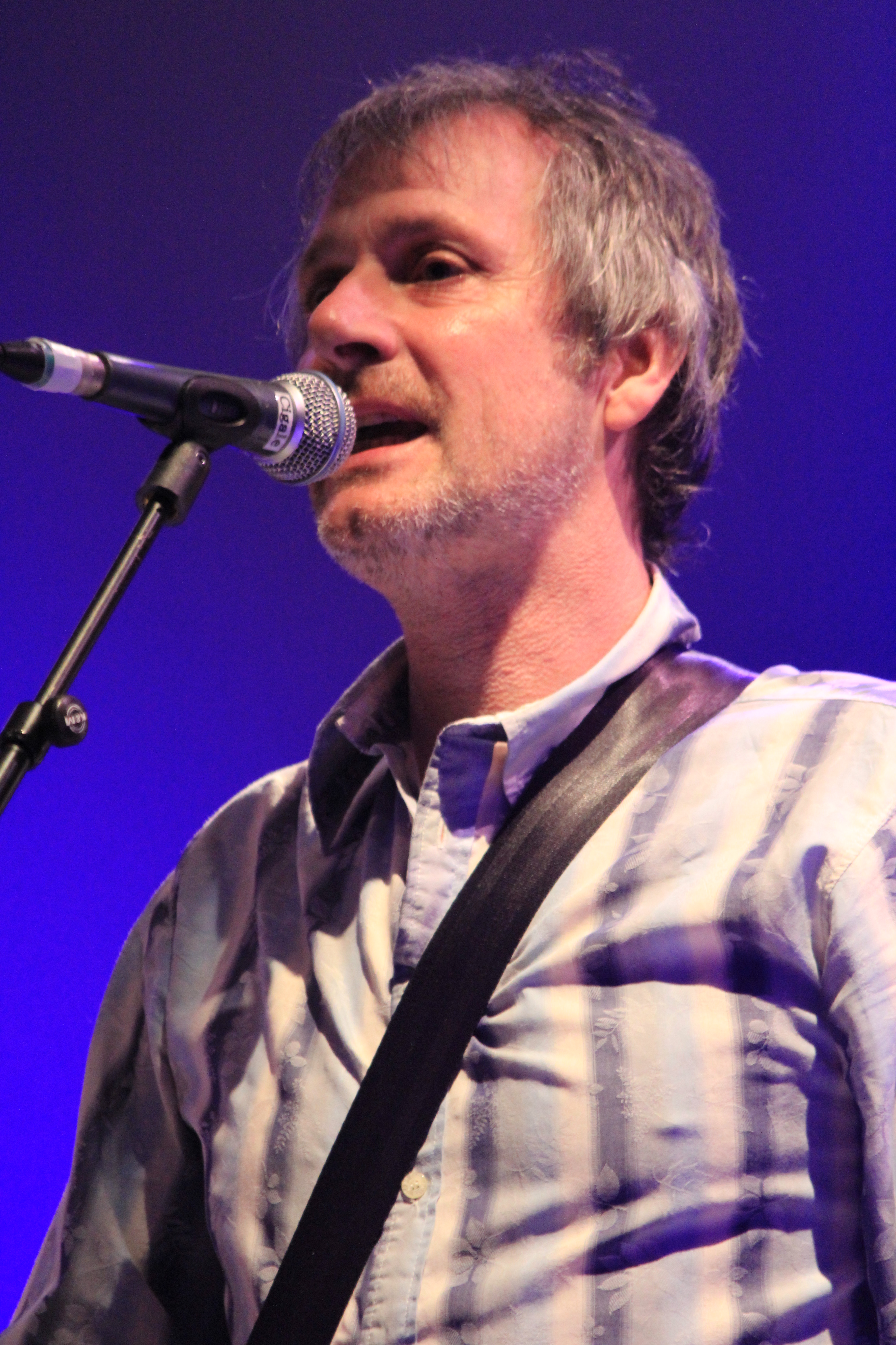 Pól Ó Braonáin pendant le concert de Clannad lors du festival interceltique de Lorient 2013